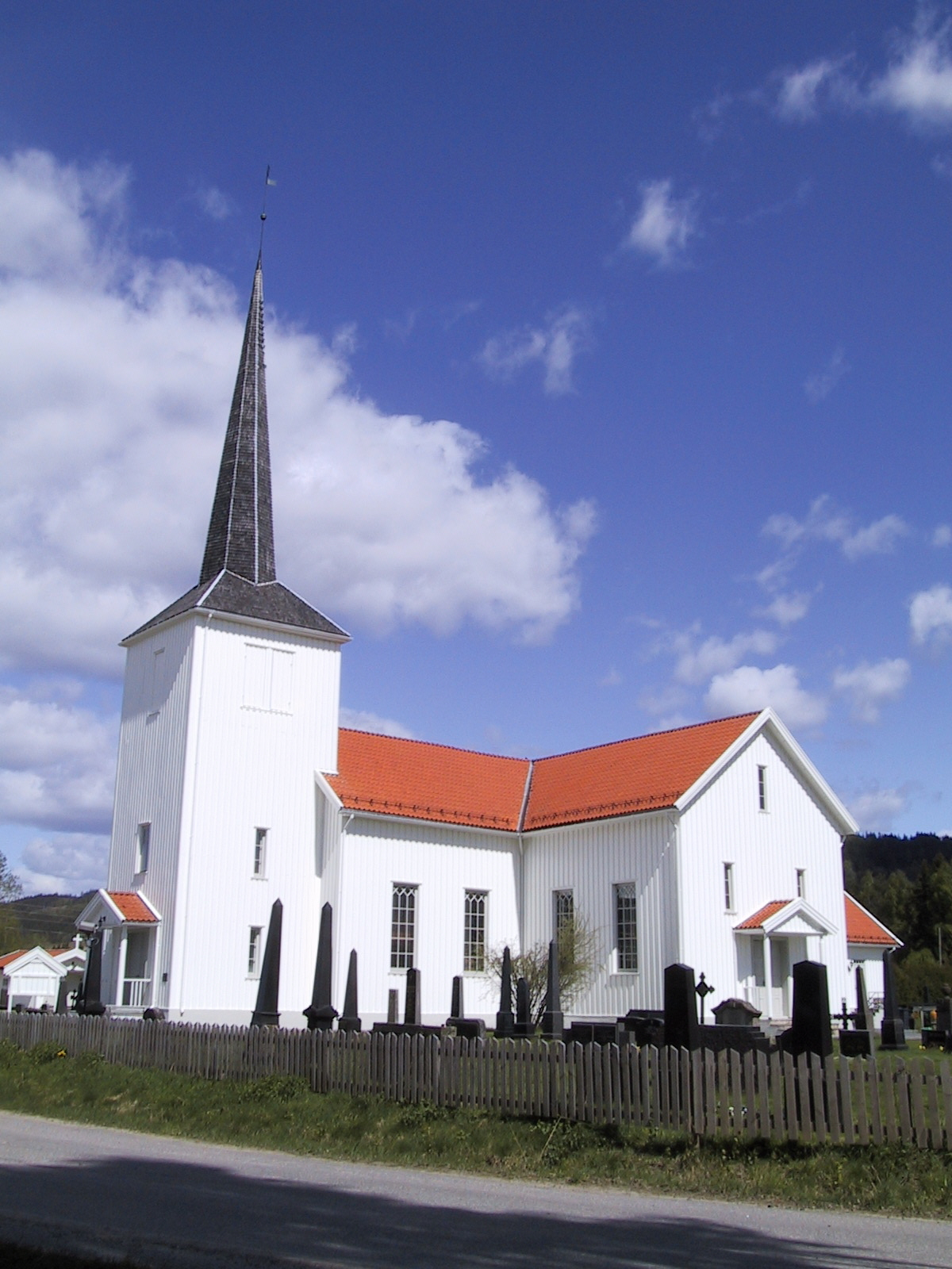 Åsnes kirke i Åsnes